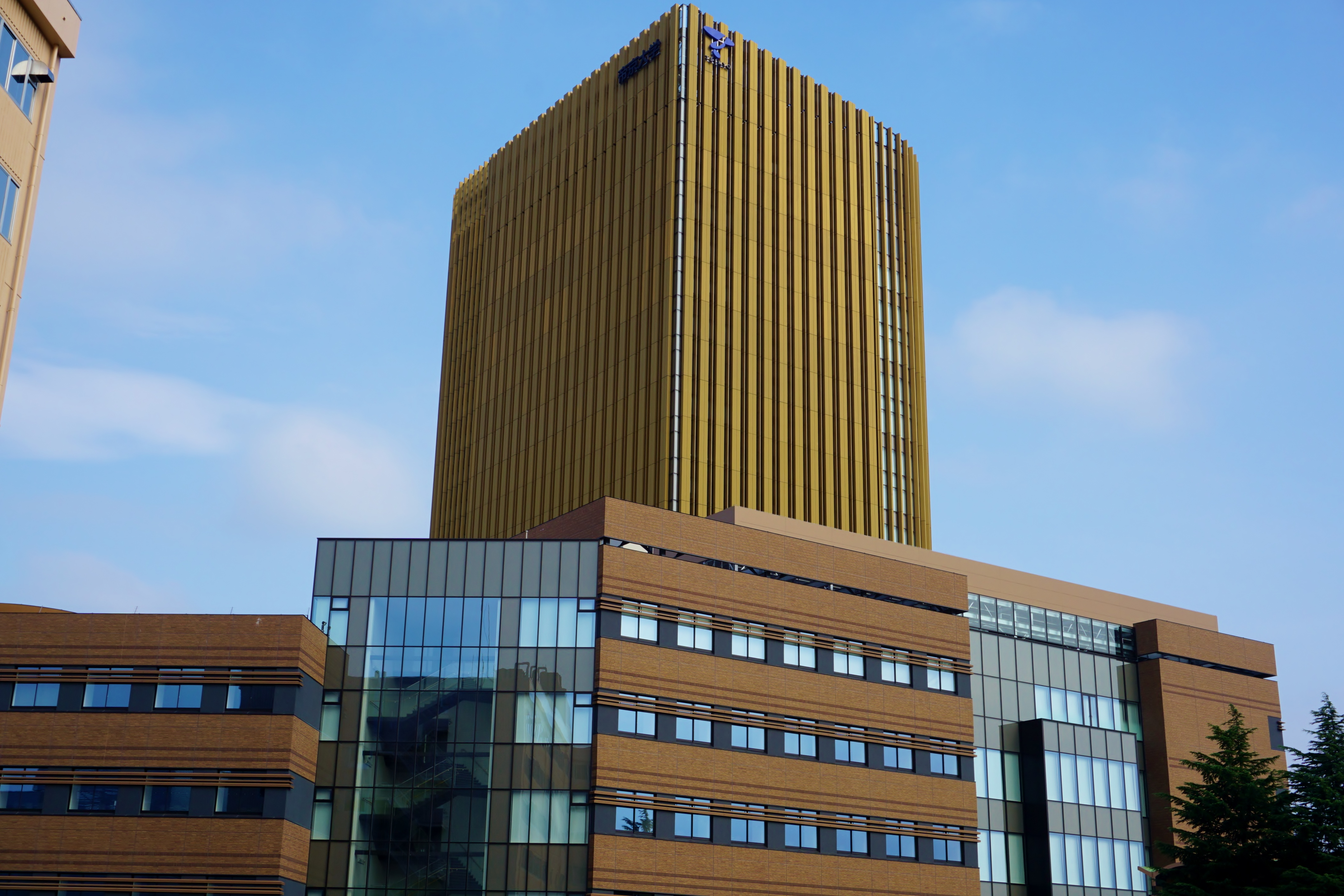 ソラティオスクエア(低層部と高層部)